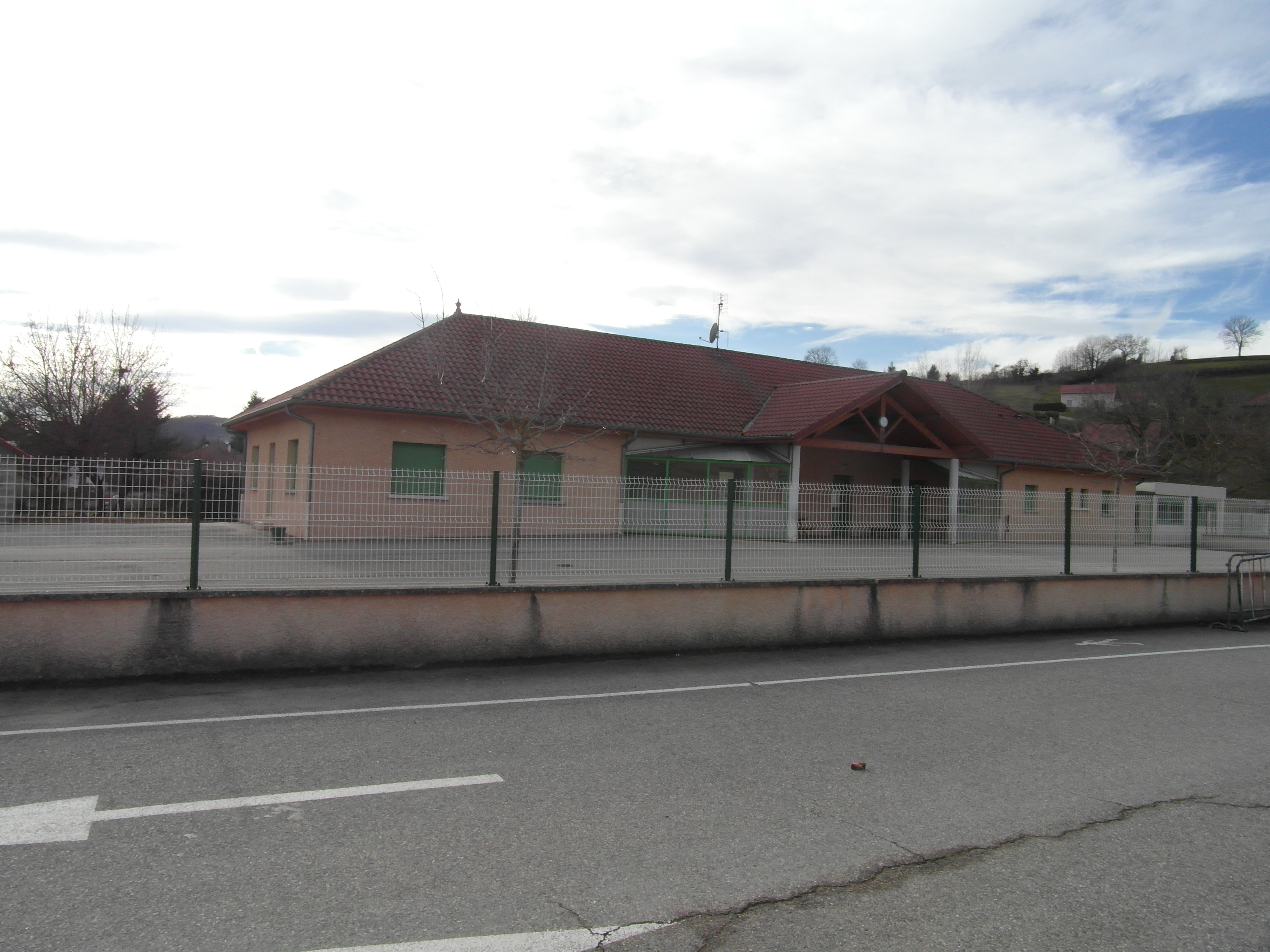 École de Belmont (Isère) en mars 2019